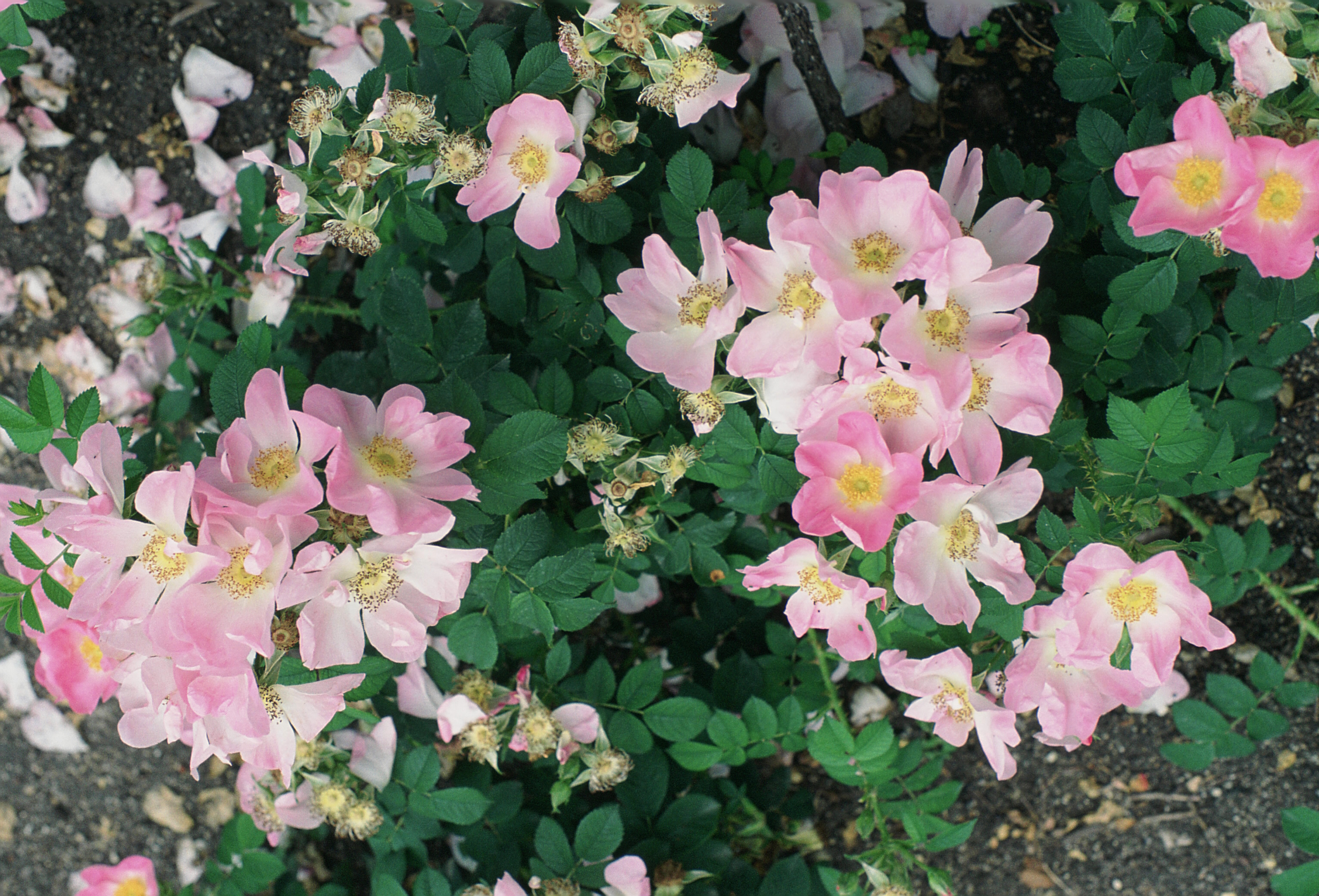 Rosa x paulii 'Rosea', sect. Cassiorhodon. Real Jardín Botánico de Madrid